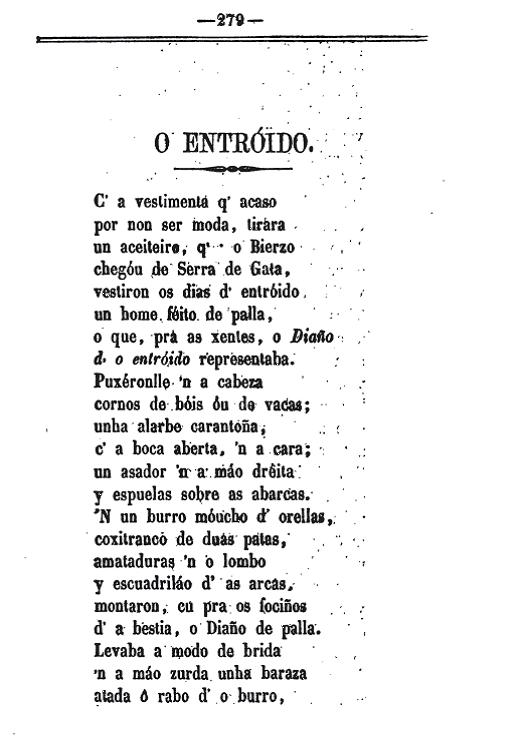 Pág 279 del libro "Ensaios poéticos en dialecto berciano (de D. Antonio Fernández y Morales) Publicado en 1861.